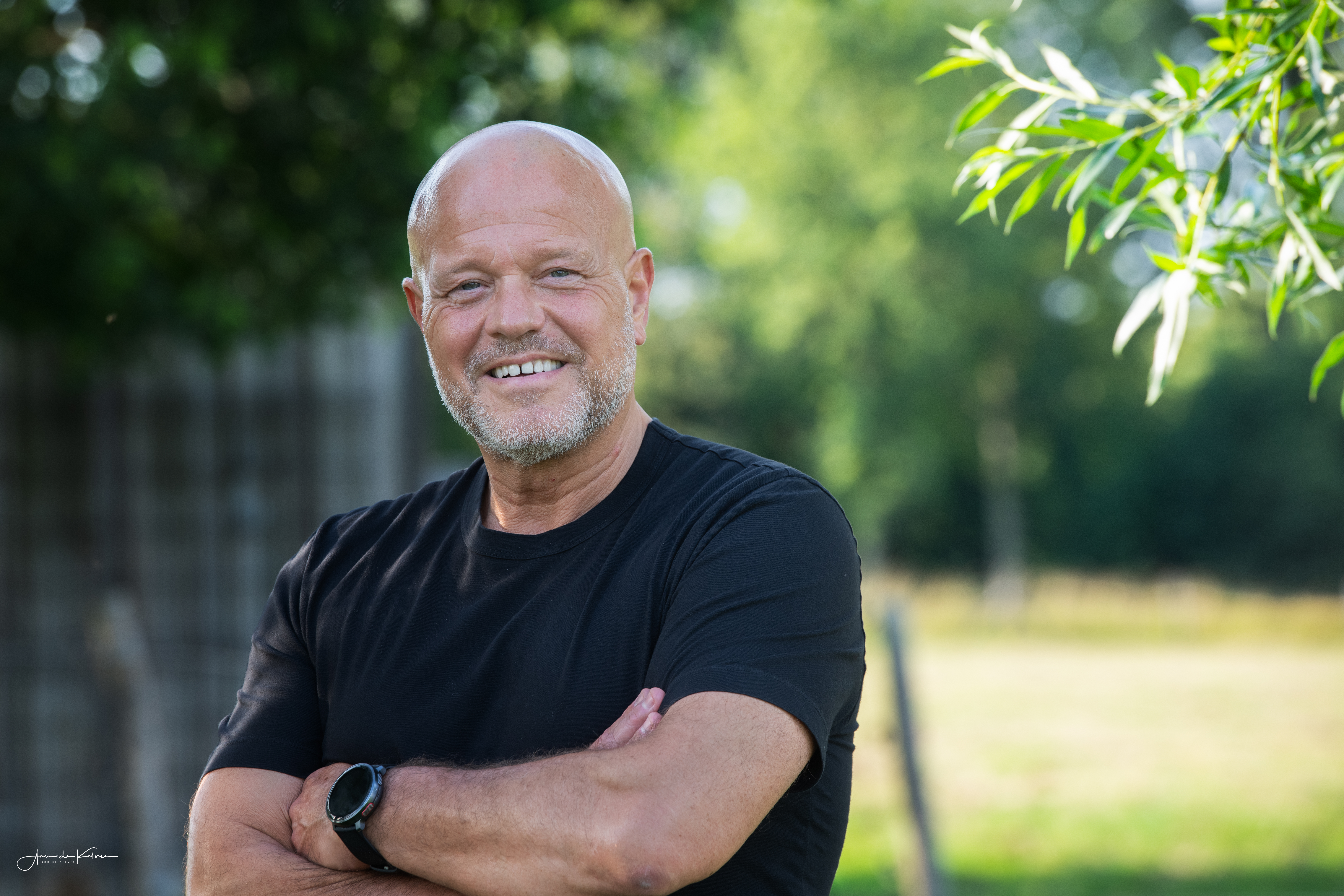 Bart Verhaeghe - Ondernemer